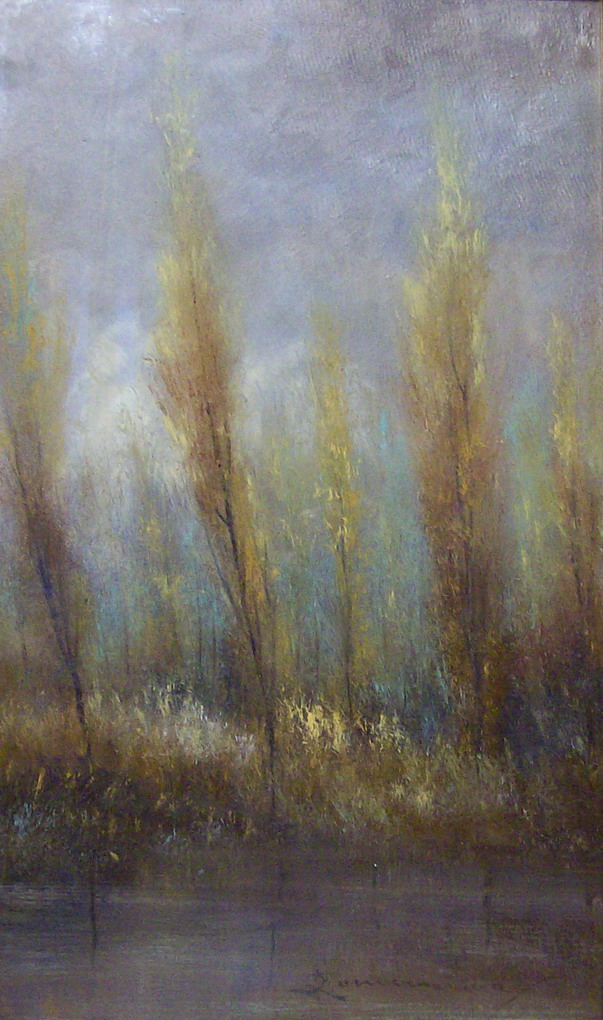 Licurgo Sommariva: le paludi